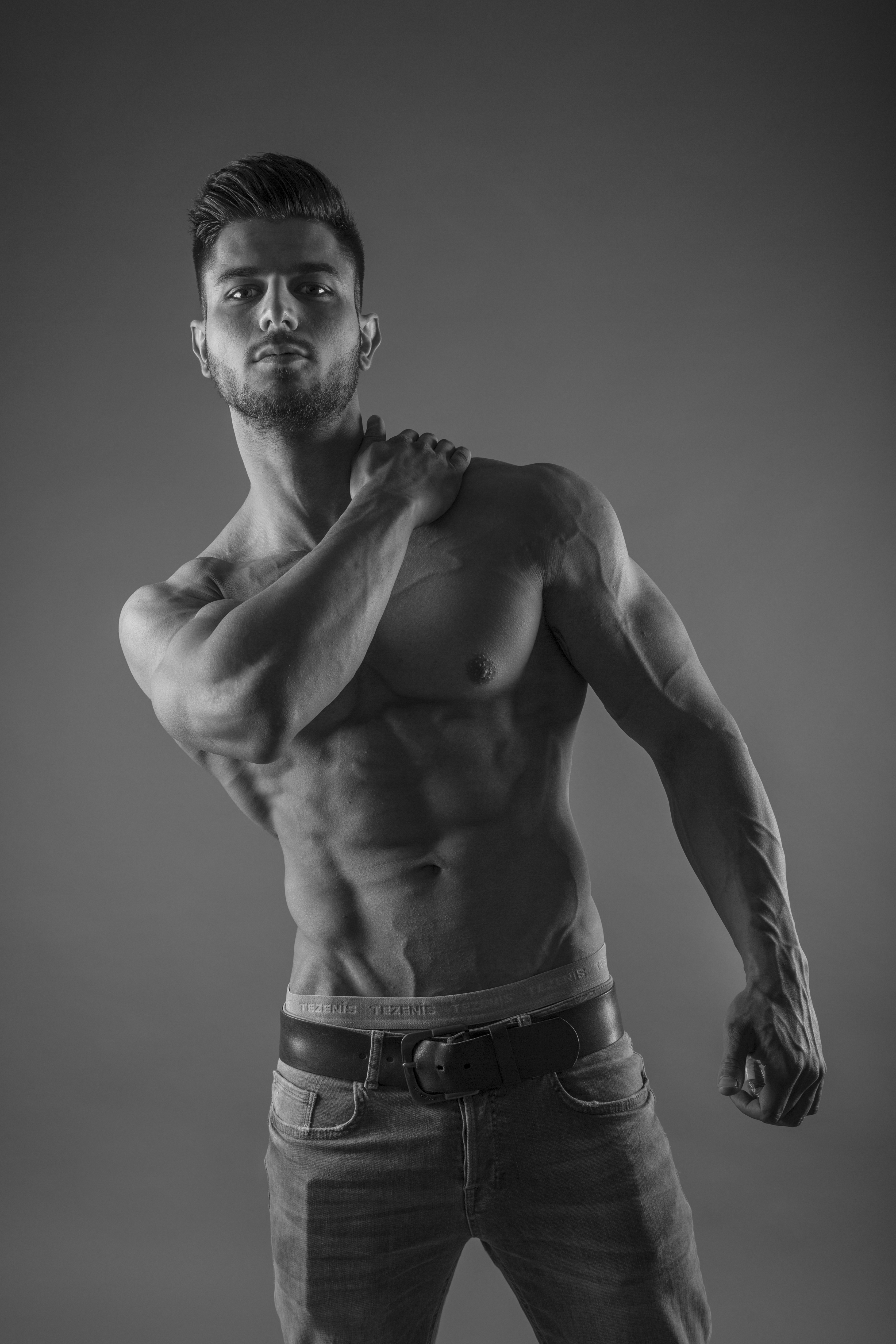 fotózás 2016